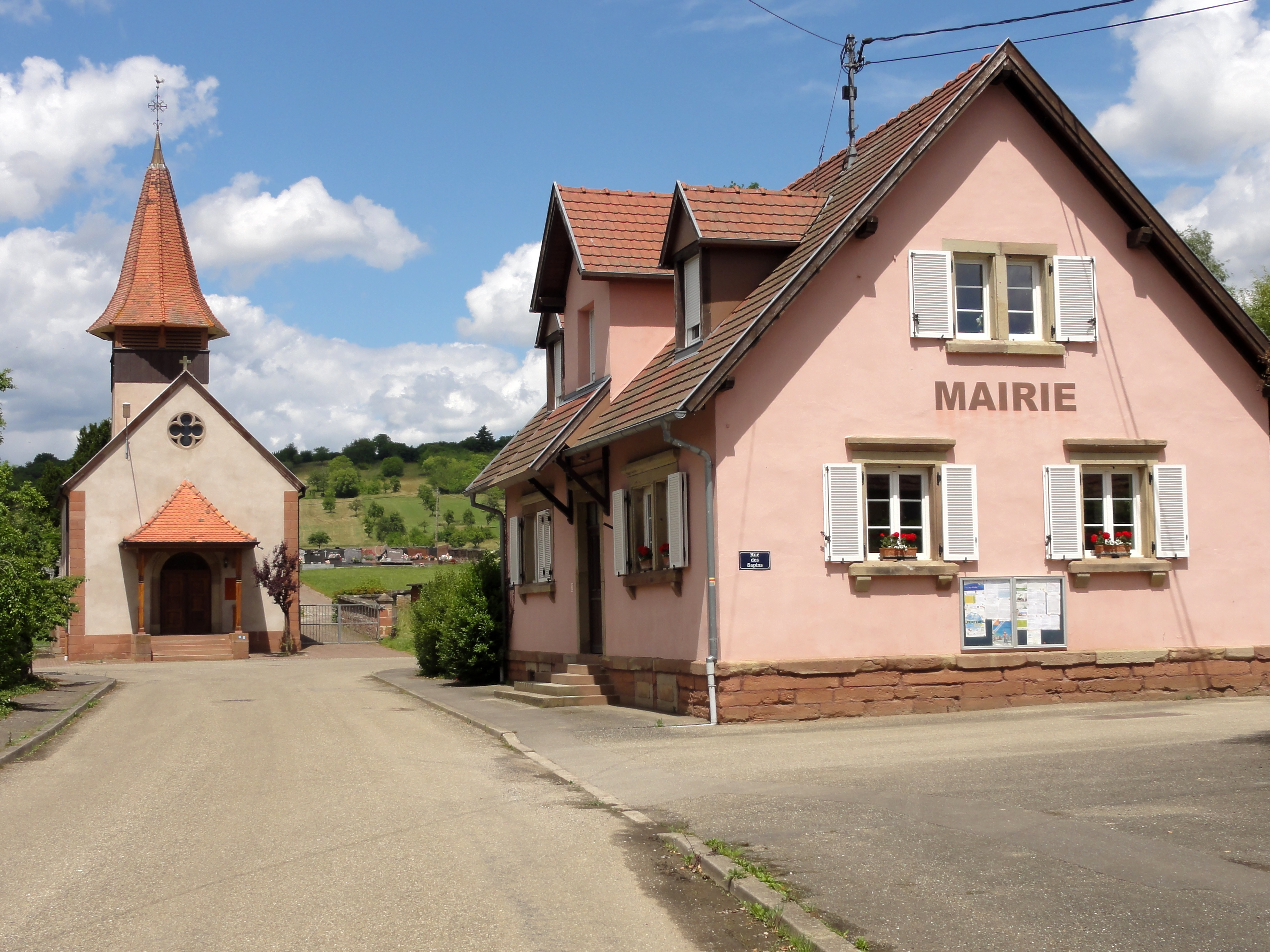 Alsace, Bas-Rhin, Issenhausen, Mairie et Église protestante (XIXe-XXe)